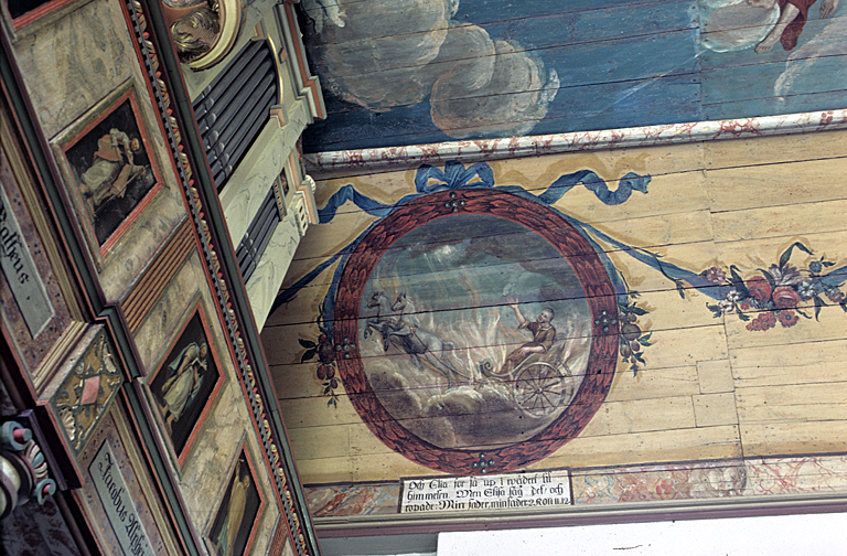 Elie himmelsfärd målad av Johan Blomberg 1774. Motiv: Rävinge kyrka Kategori: (03) Målningar på trä Elie himmelsfärd målad av Johan Blomberg 1774.